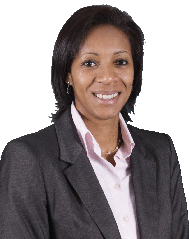 Congresista Leyla Chihuan Ramos